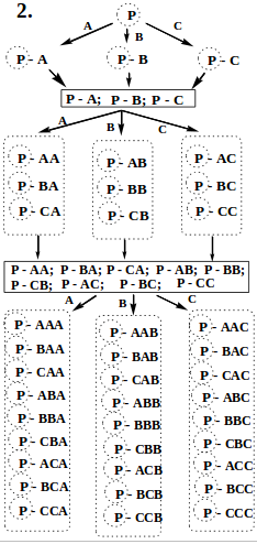 Եռպեպտիդների սինթեզի հնարավոր տարբերակները